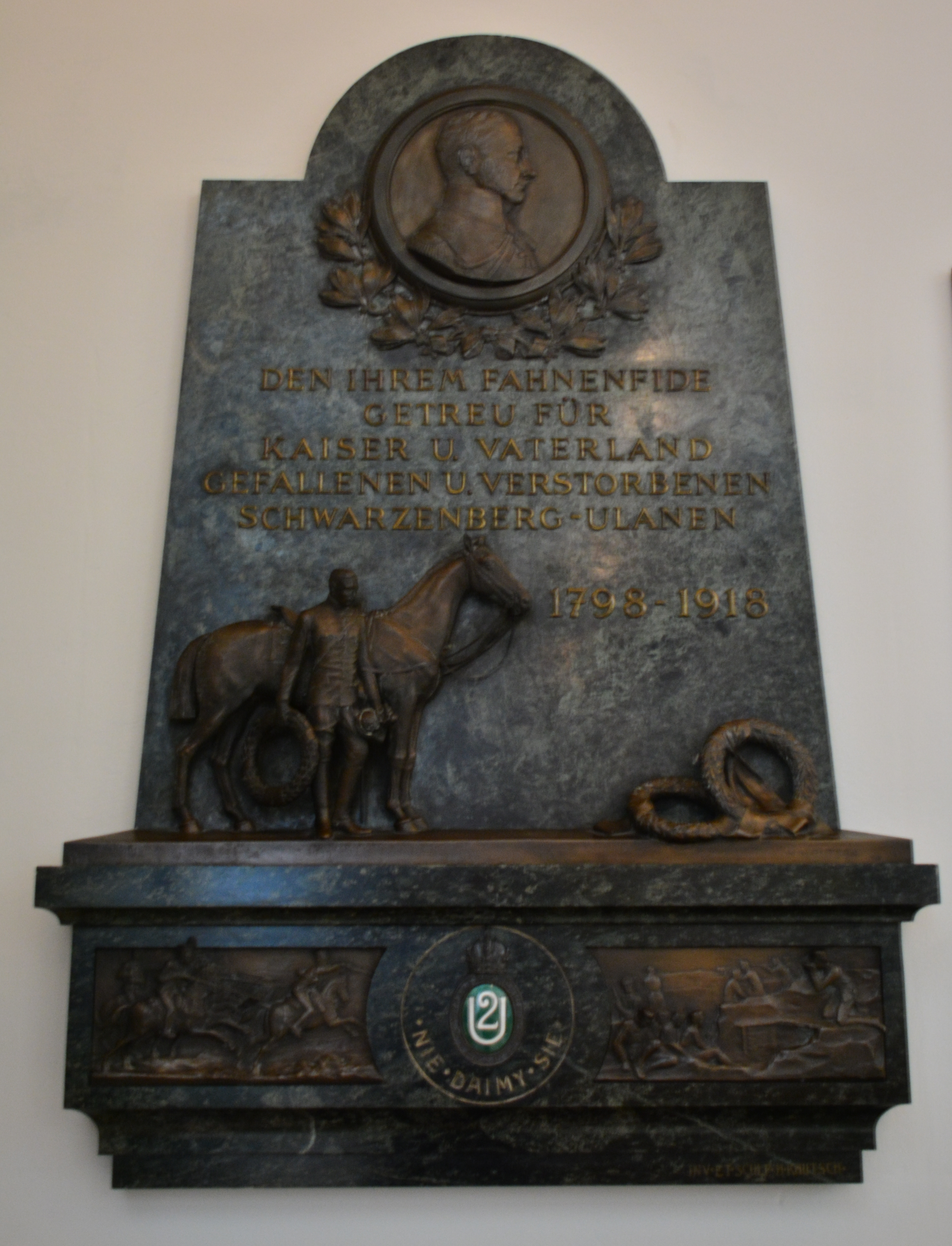 Gedenktafel für das k.u.k. Ulanenregiment Nr. 2 (Wien, Neuer Markt, Kapuzinerkirche)